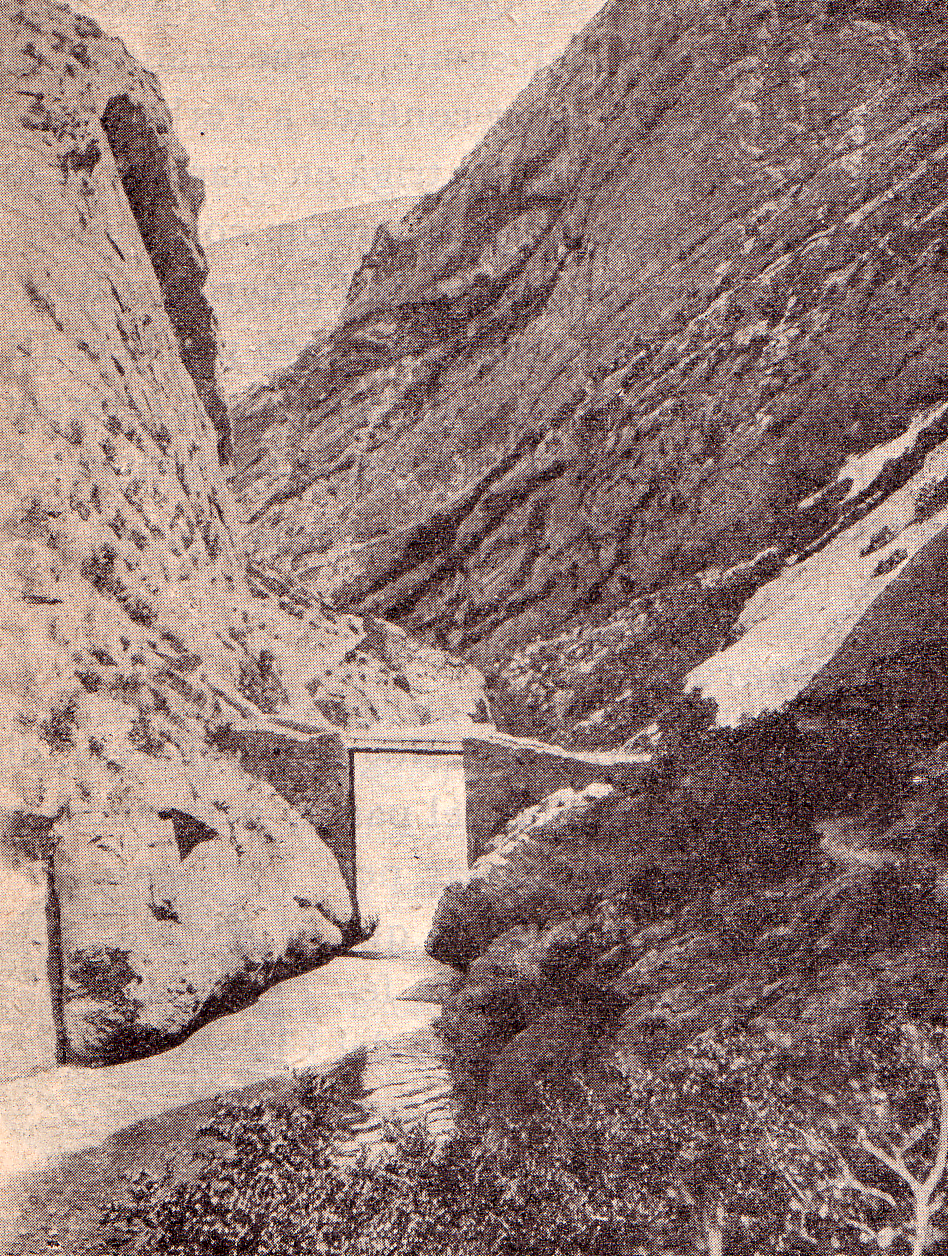 El Pont de Terradets vers el 1912 (Guàrdia de Tremp, Castell de Mur, Pallars Jussà)